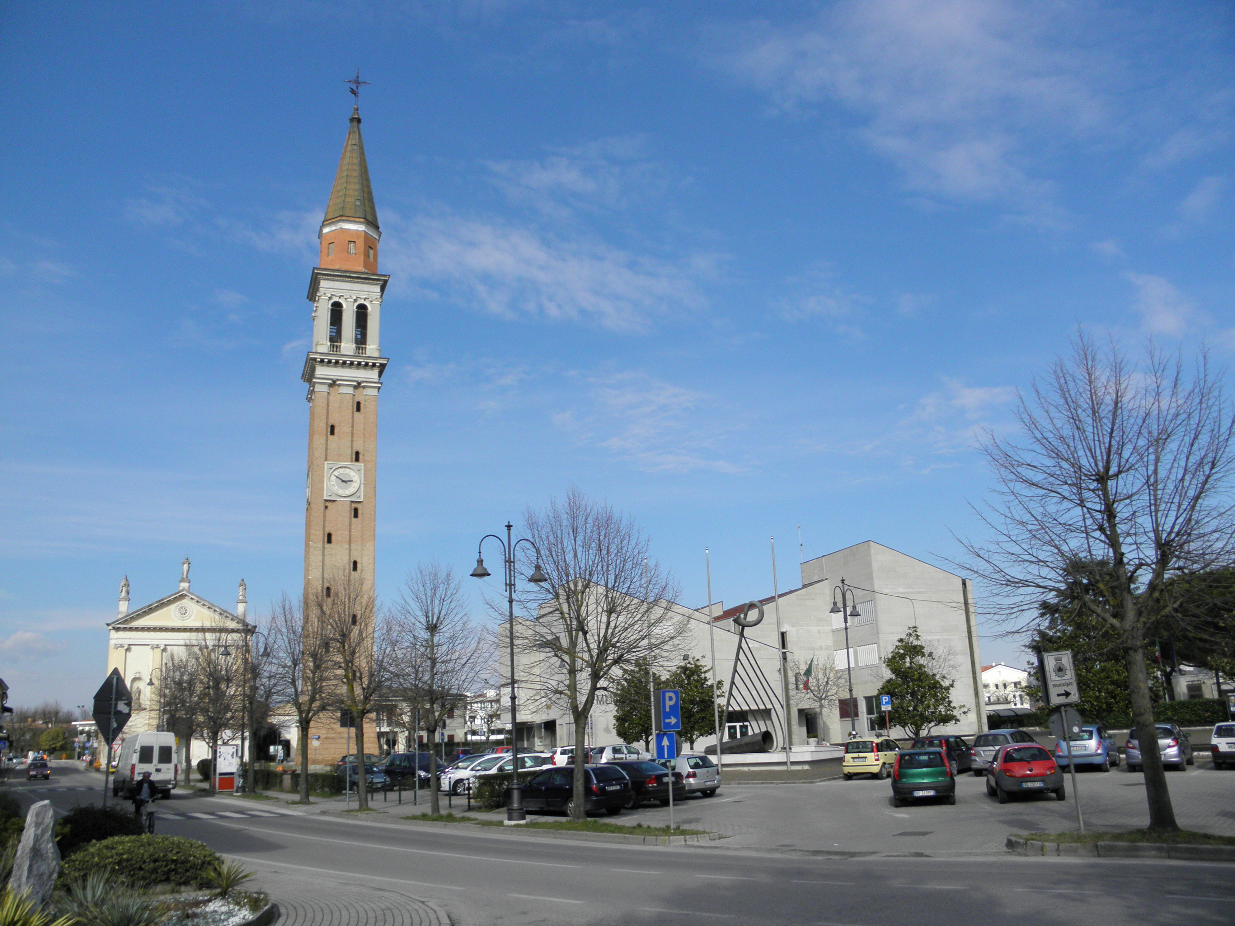 Camponogara, vista della chiesa parrocchiale di Santa Maria Assunta e San Prosdocimo e, sulla destra la palazzina municipale.